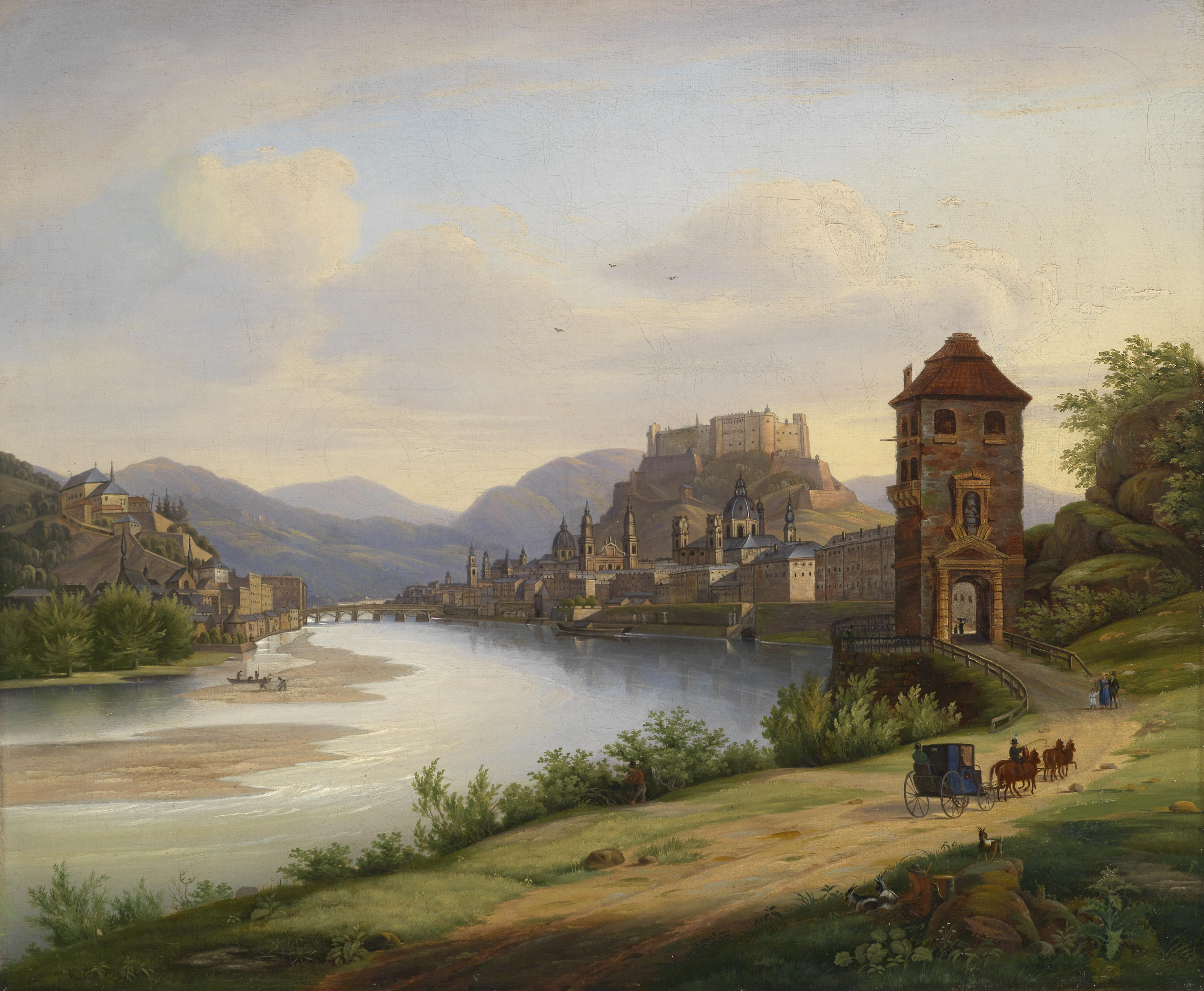 Blick auf Salzburg, signiert und datiert J. Roedler (ligiert) 1833, Öl auf Leinwand, 45,5 x 55,5 cm